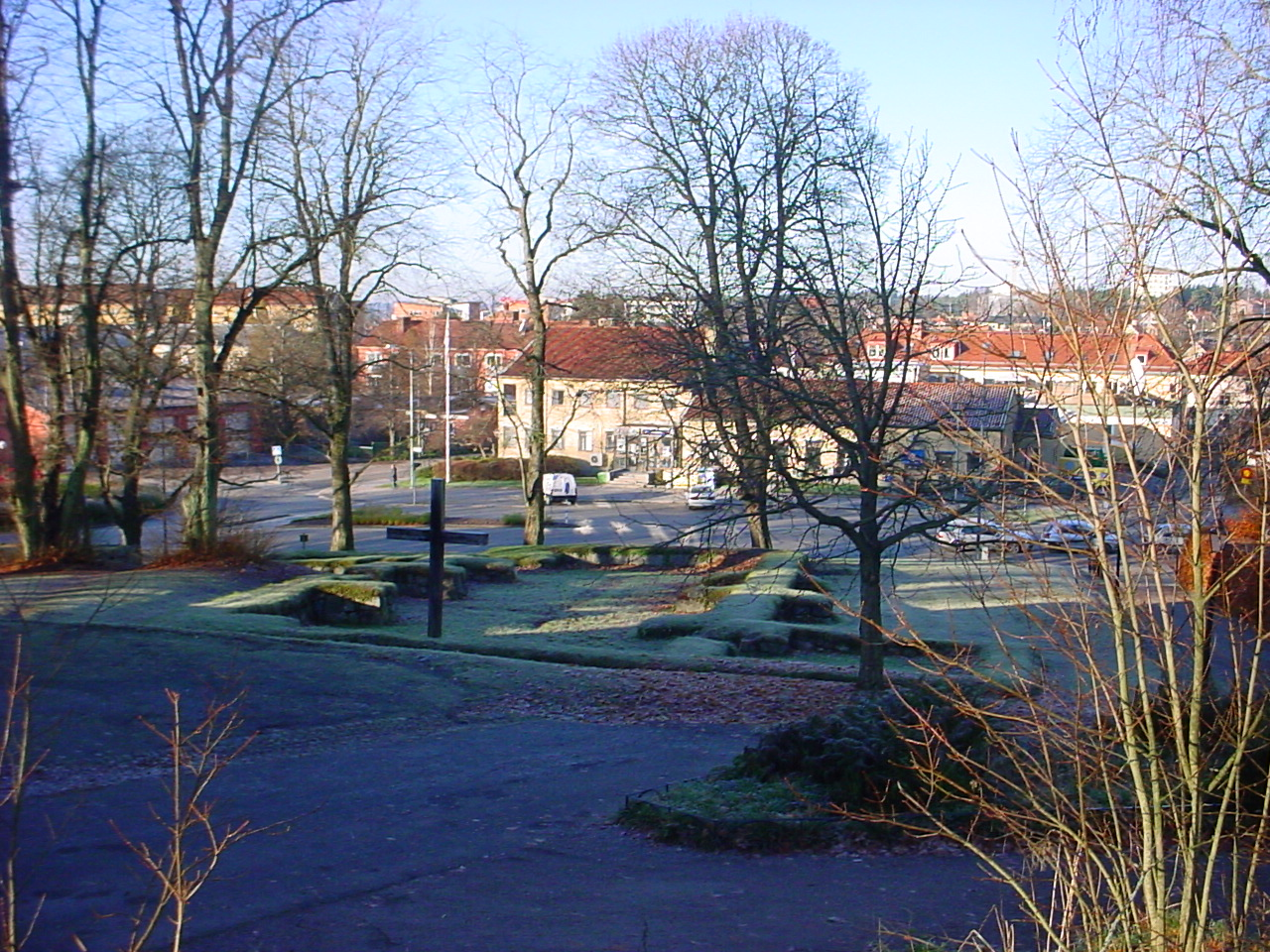 Ruinerna efter Sankt Ilians kyrka, Enköping.